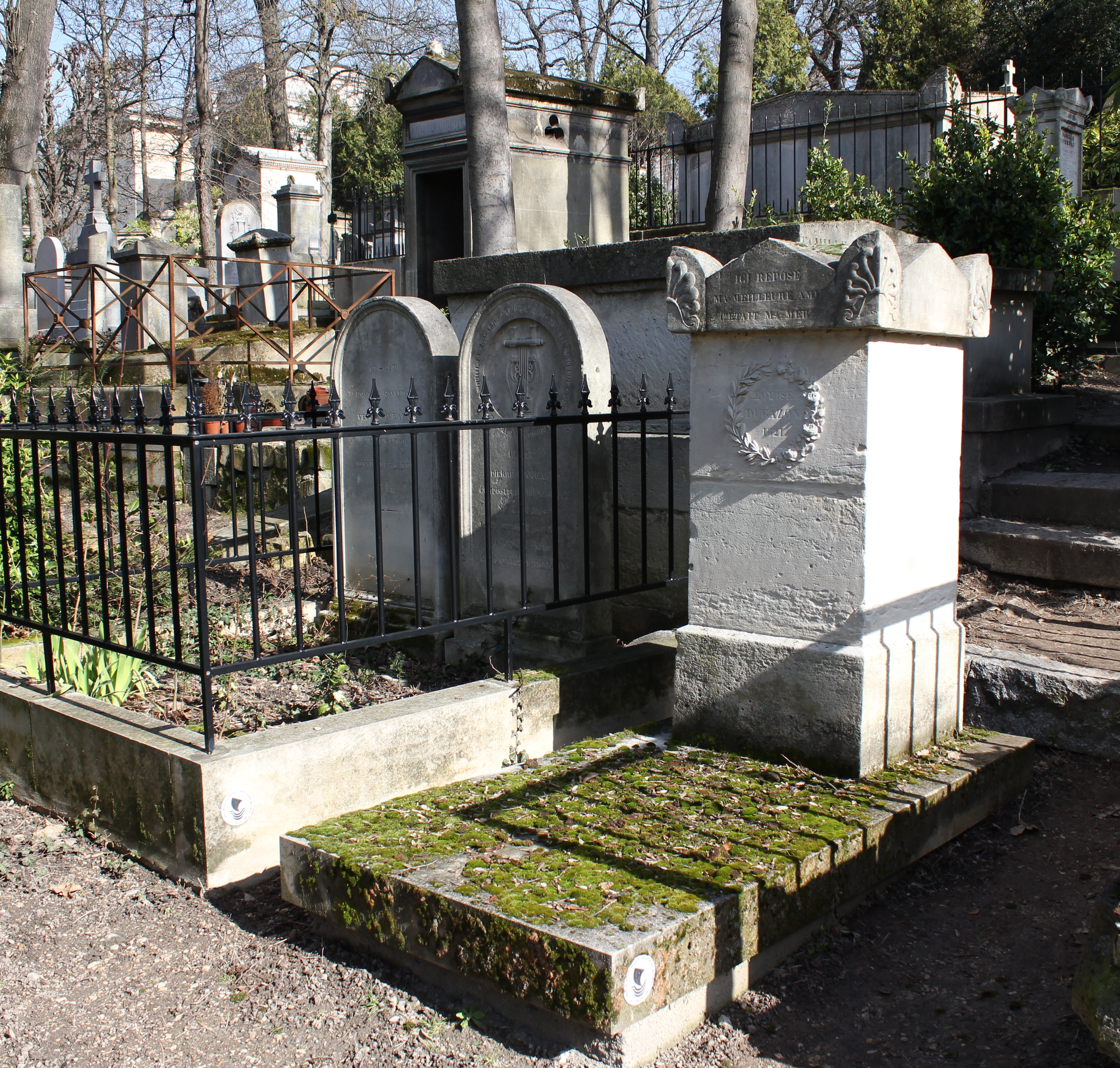 Stèle quadrangulaire ornée sur sa face antérieure d'une couronne sculptée comprenant une branche de laurier et une branche de rosier. Sépulture de la famille Dugazon comprenant : Jean-Henri Gourgaud, dit Dugazon (1746-1809), acteur Louise-Rosalie Lefebvre, dite Madame Dugazon, (1755-1821), comédienne, chanteuse et danseuse et épouse de Dugazon Gustave Dugazon (1782-1829), compositeur et fils de Dugazon et Madame Dugazon vue générale